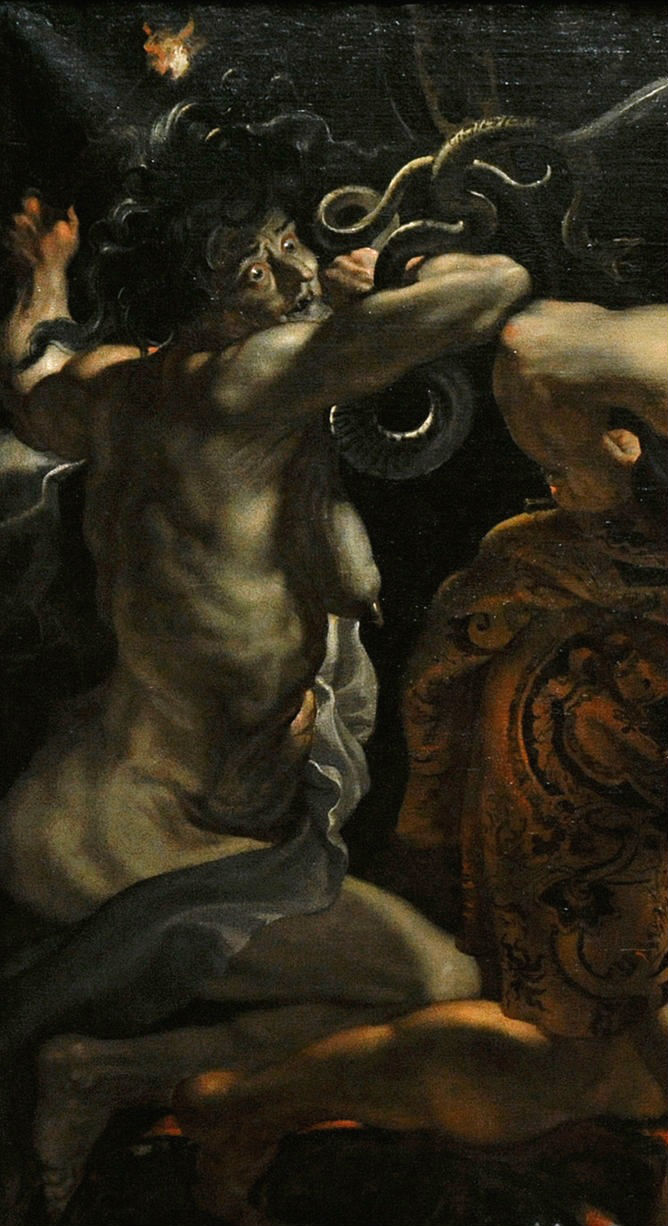 Rubens - Tarquinio e Lucrezia (Ermitage) - La Furia (particolare)